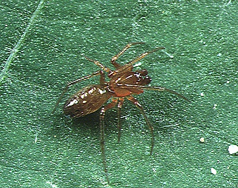 male Coleosoma floridanum from Okinawa.